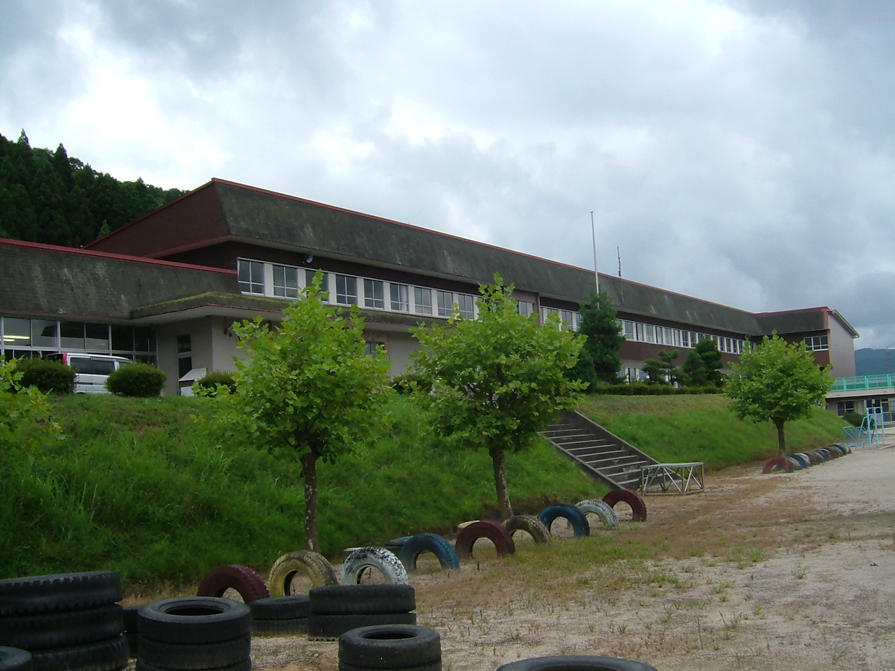 真庭市立八束小学校校舎2